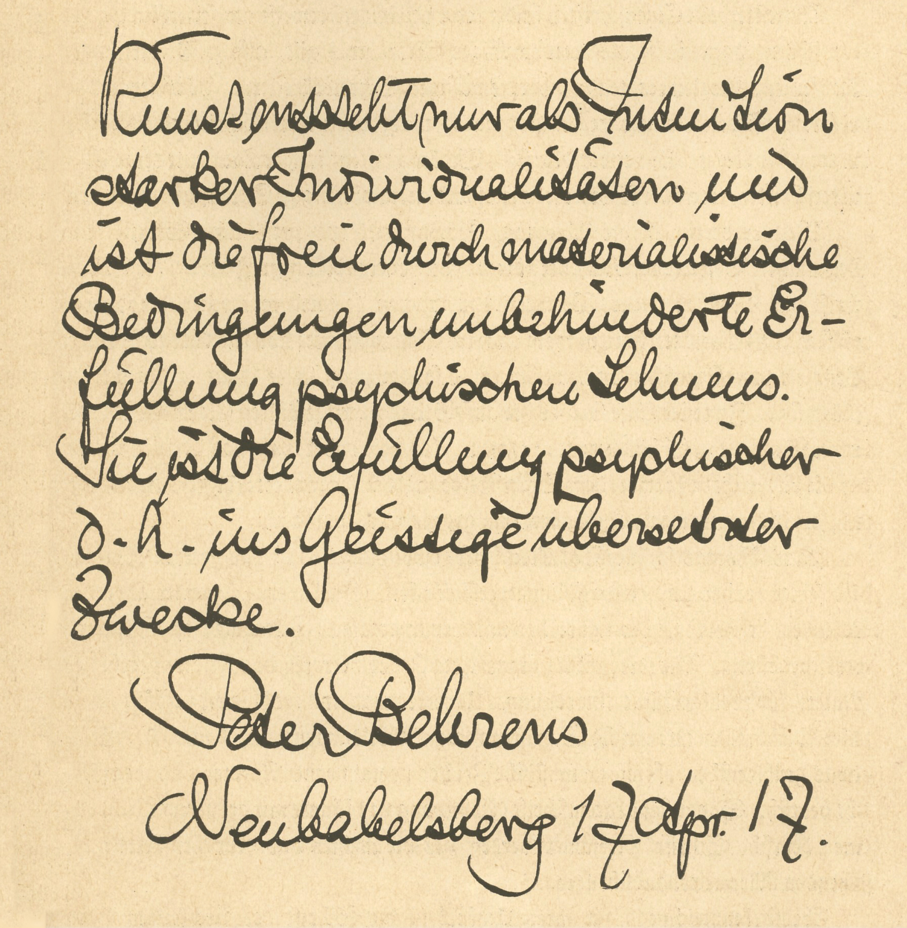 Handschrift des Architekten Peter Behrens vom 17. April 1917